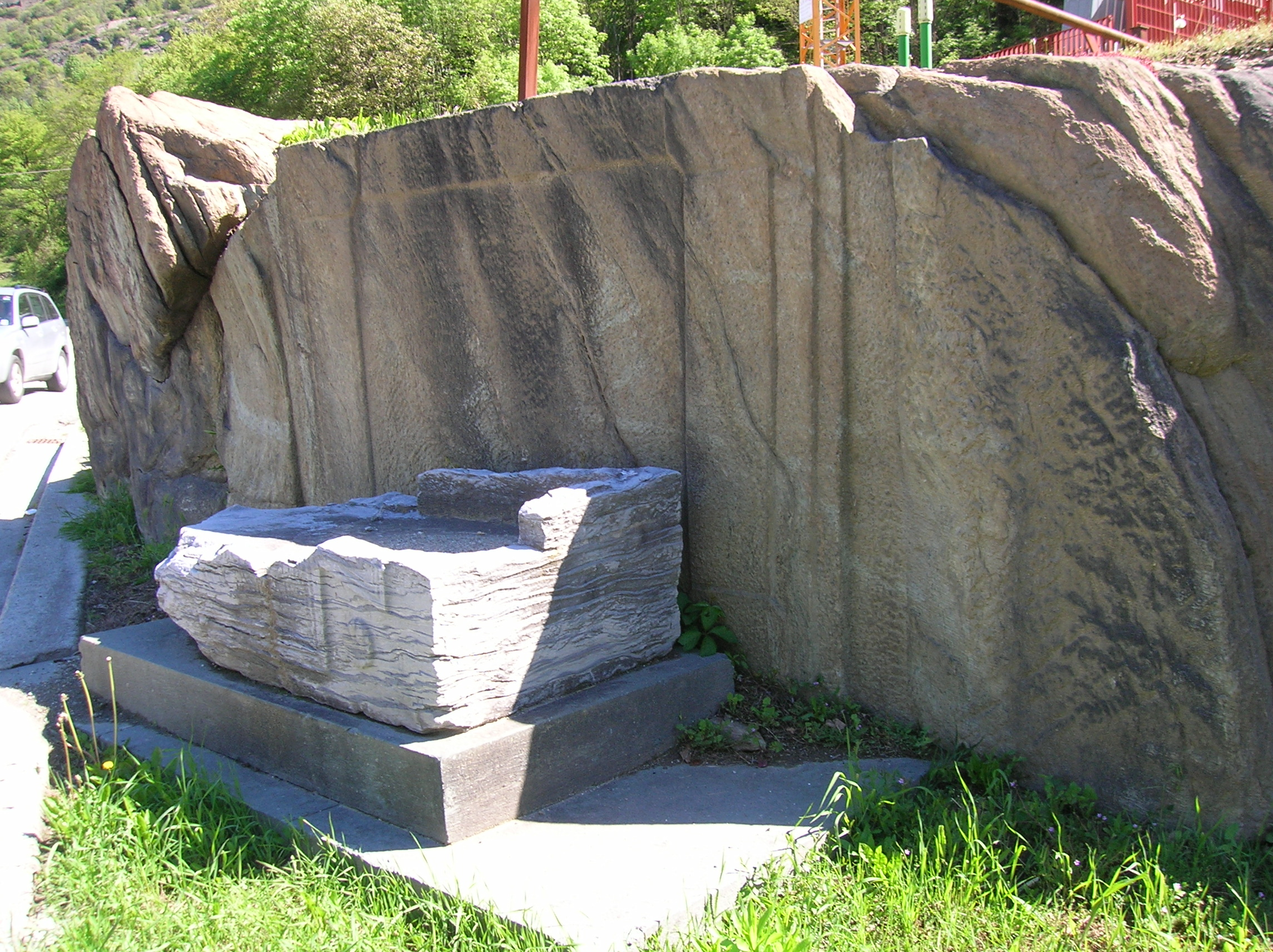 Tratto di via delle gallie e tomba romana lungo la SS 26. Montjovet, Valle d'Aosta, Italia.